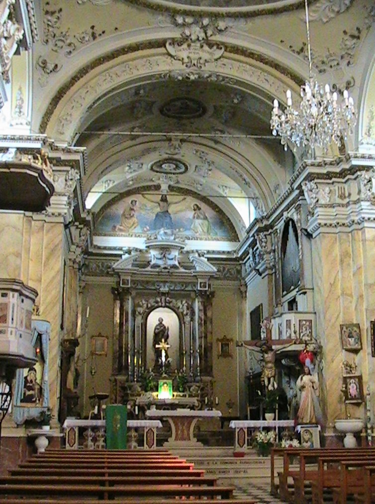 Cappella de' Picenardi - Chiesa parrocchiale di San Pancrazio Martire